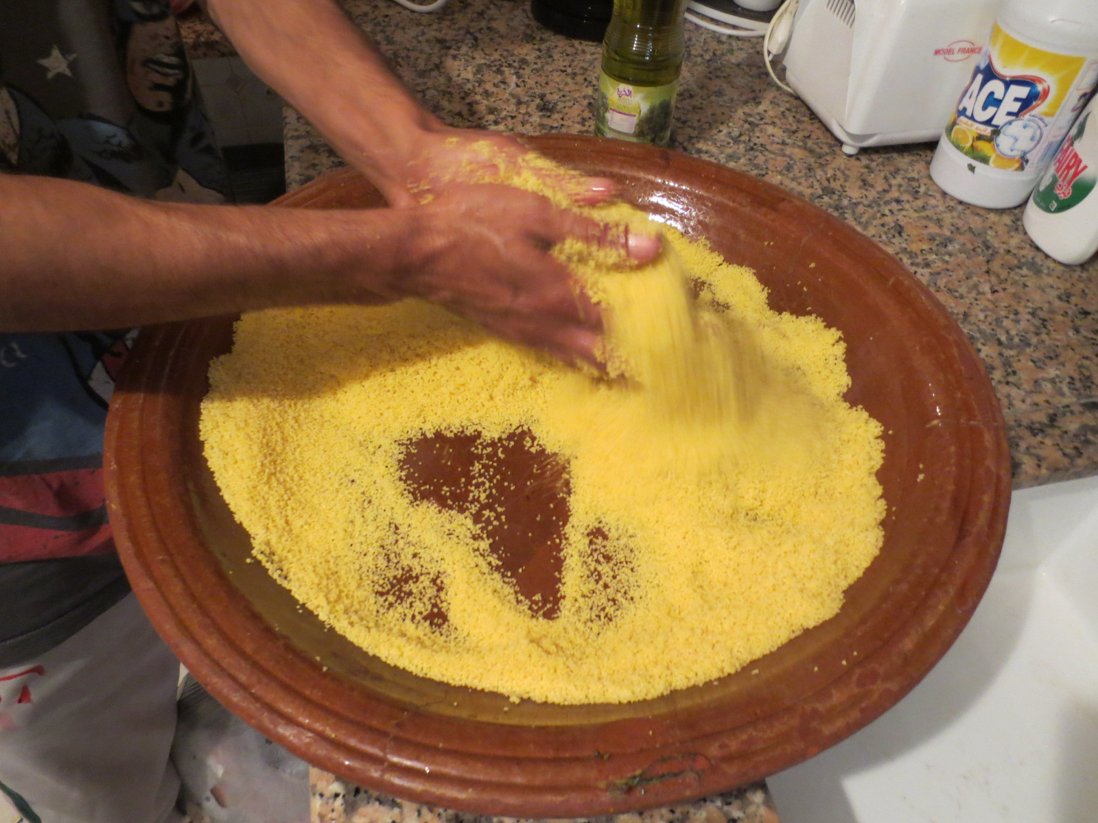 Couscous